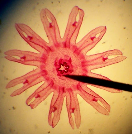 Ефіра медузи роду Aurelia